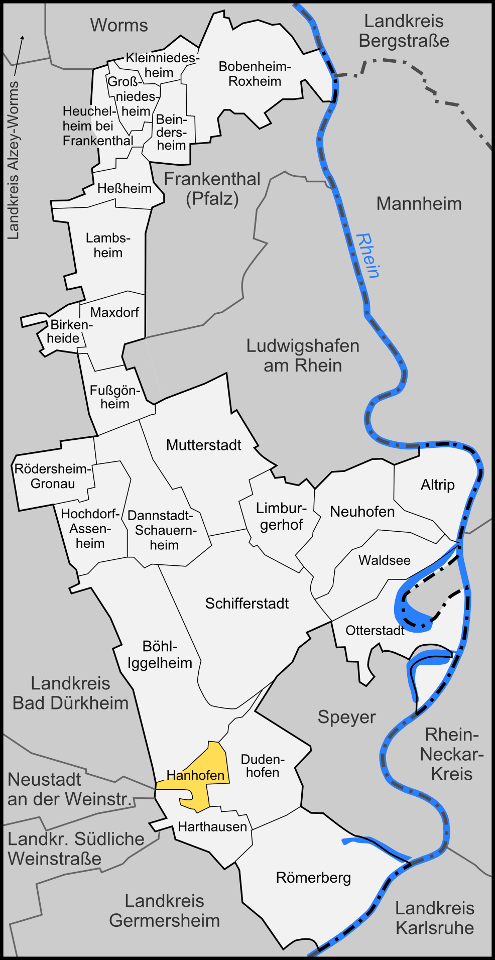 Karte der Gemeinde Hanhofen im Rhein-Pfalz-Kreis